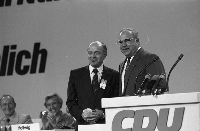 7./8.10.1986 34. Bundesparteitag der CDU in der Rheingoldhalle, Mainz (6.-8.10.1986)